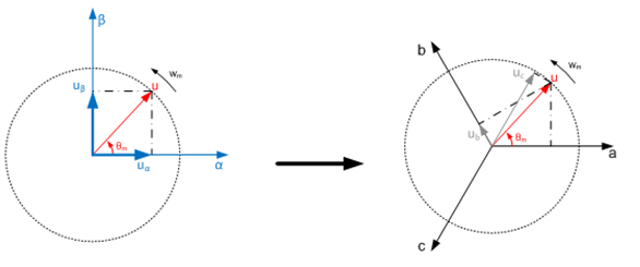 Clarke-n Antitransformatua